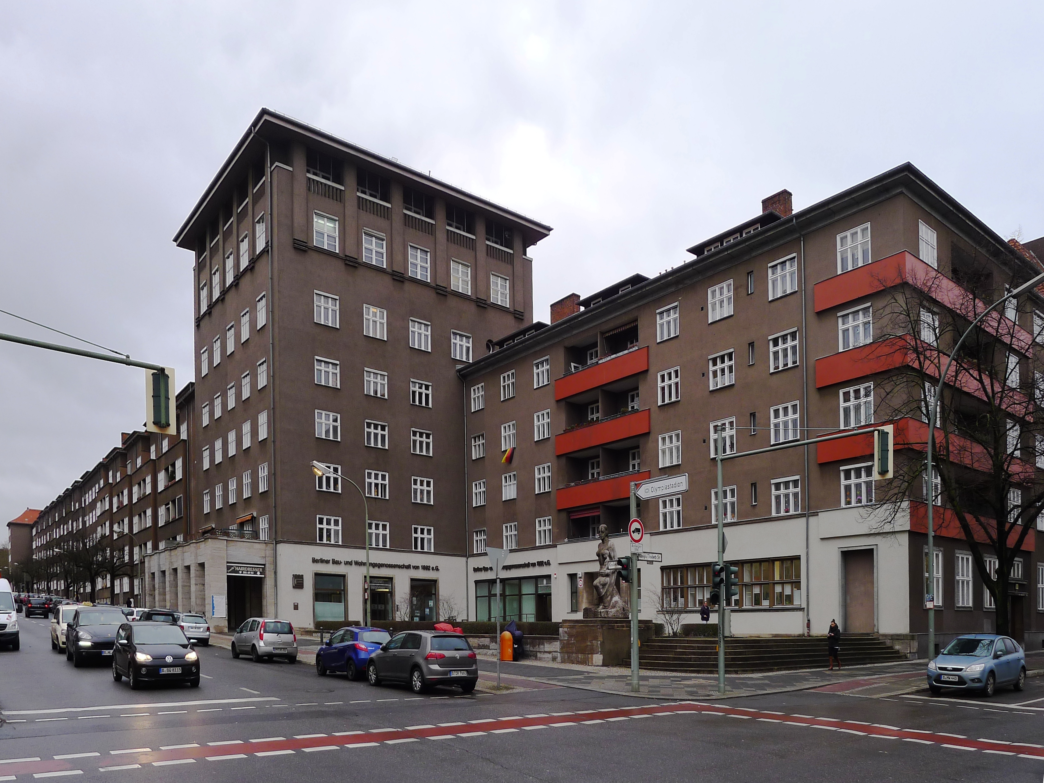 Wohnanlage